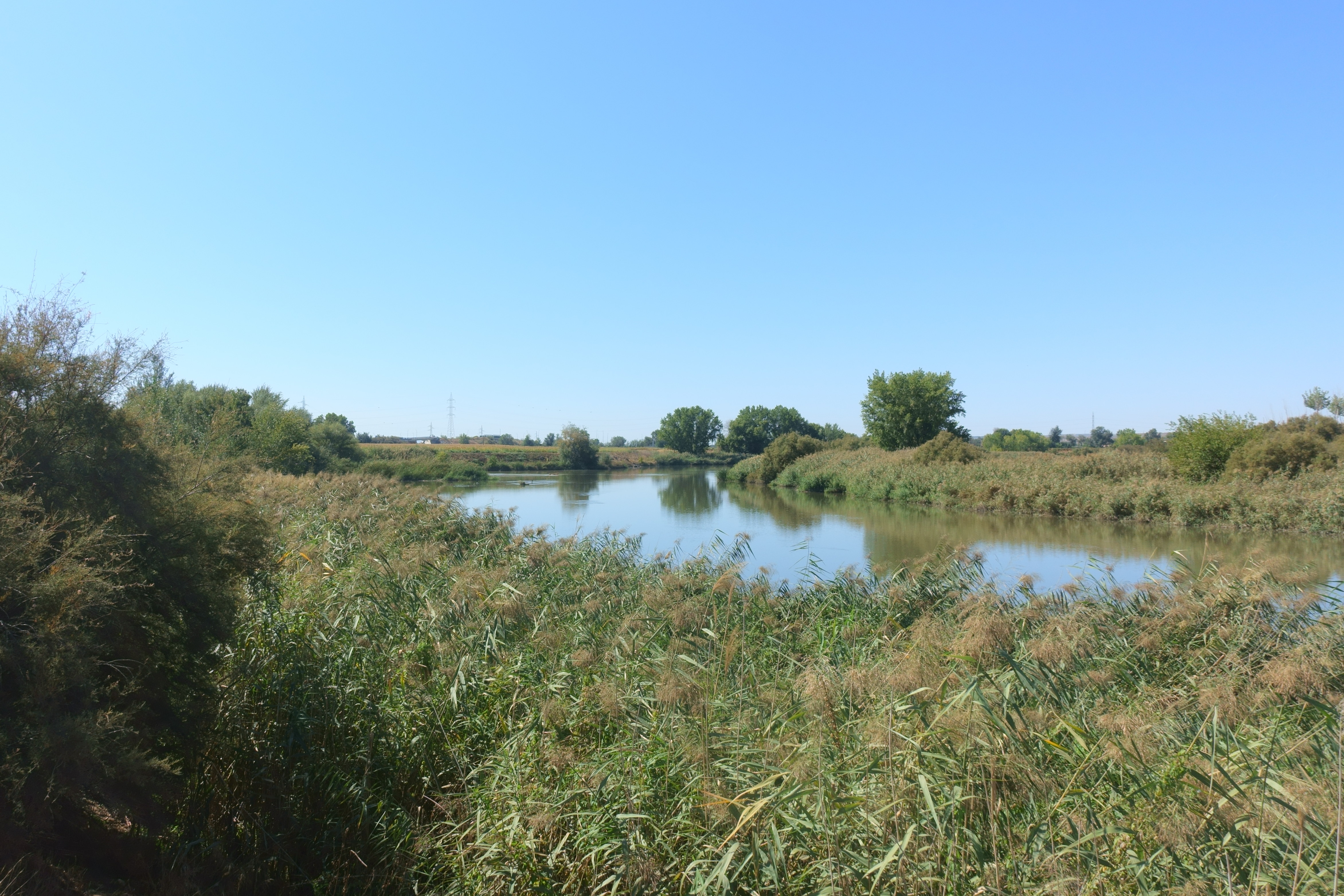 El río Jarama poco antes de desembocar en el río Tajo, a la altura de Aranjuez (Madrid, España).